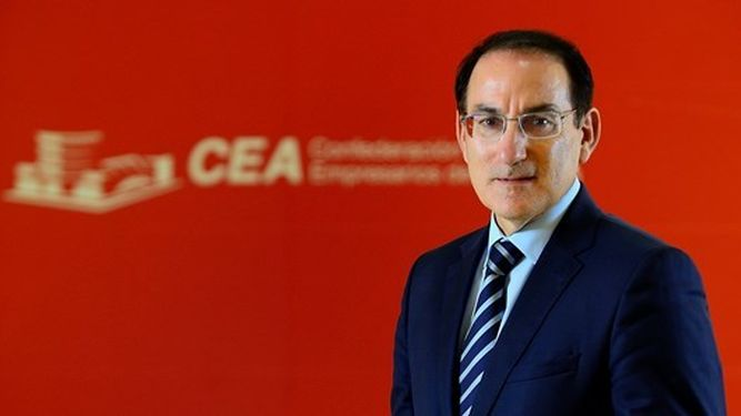 Fotografía del Presidente de CEA